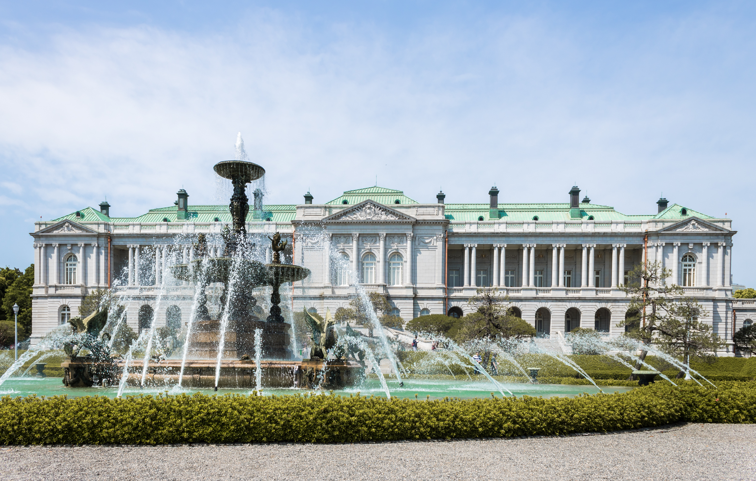 赤坂迎賓館（国宝）